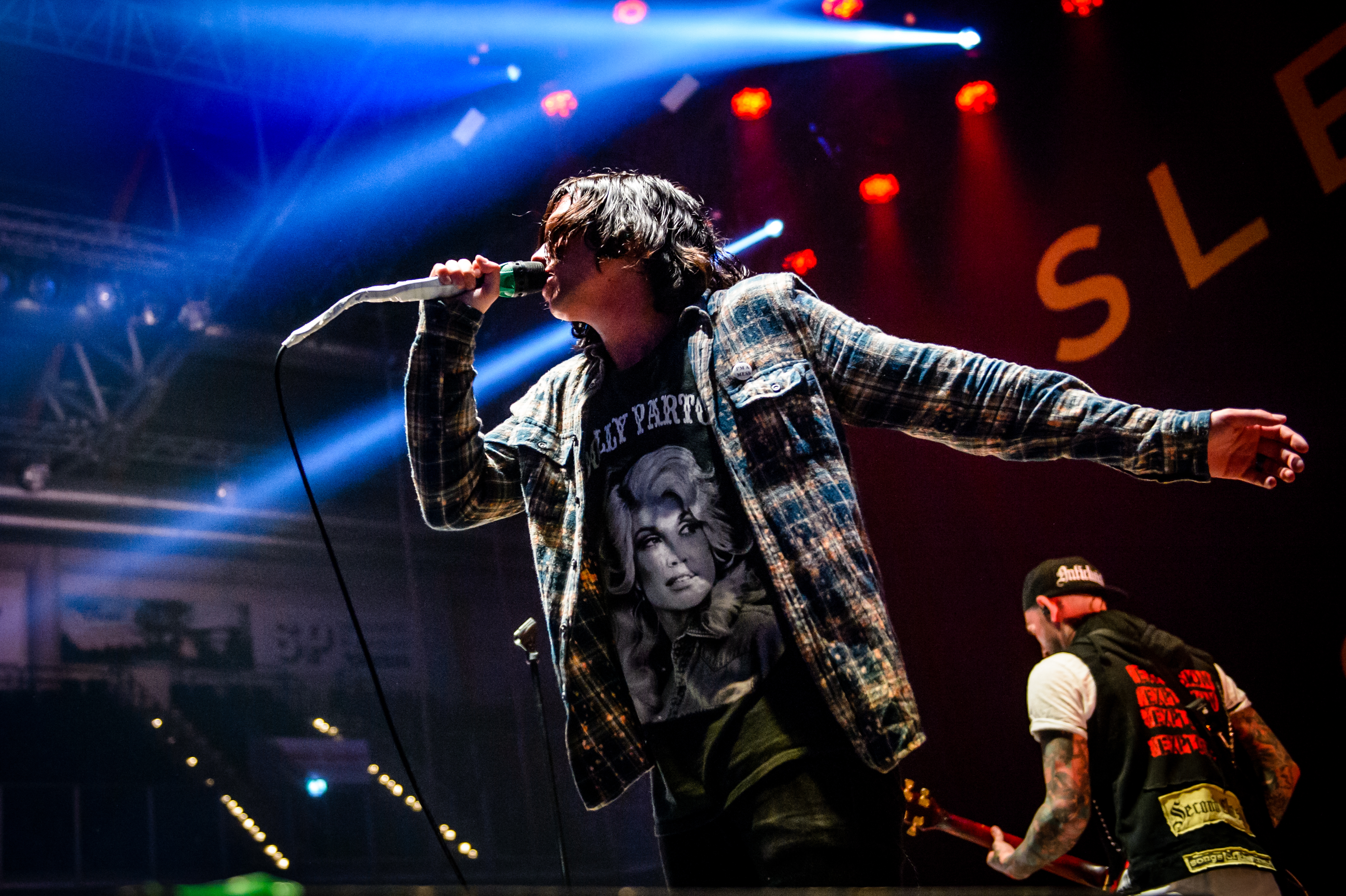 'Rock im Park 2017; Nürnberg': 'Sleeping With Sirens'